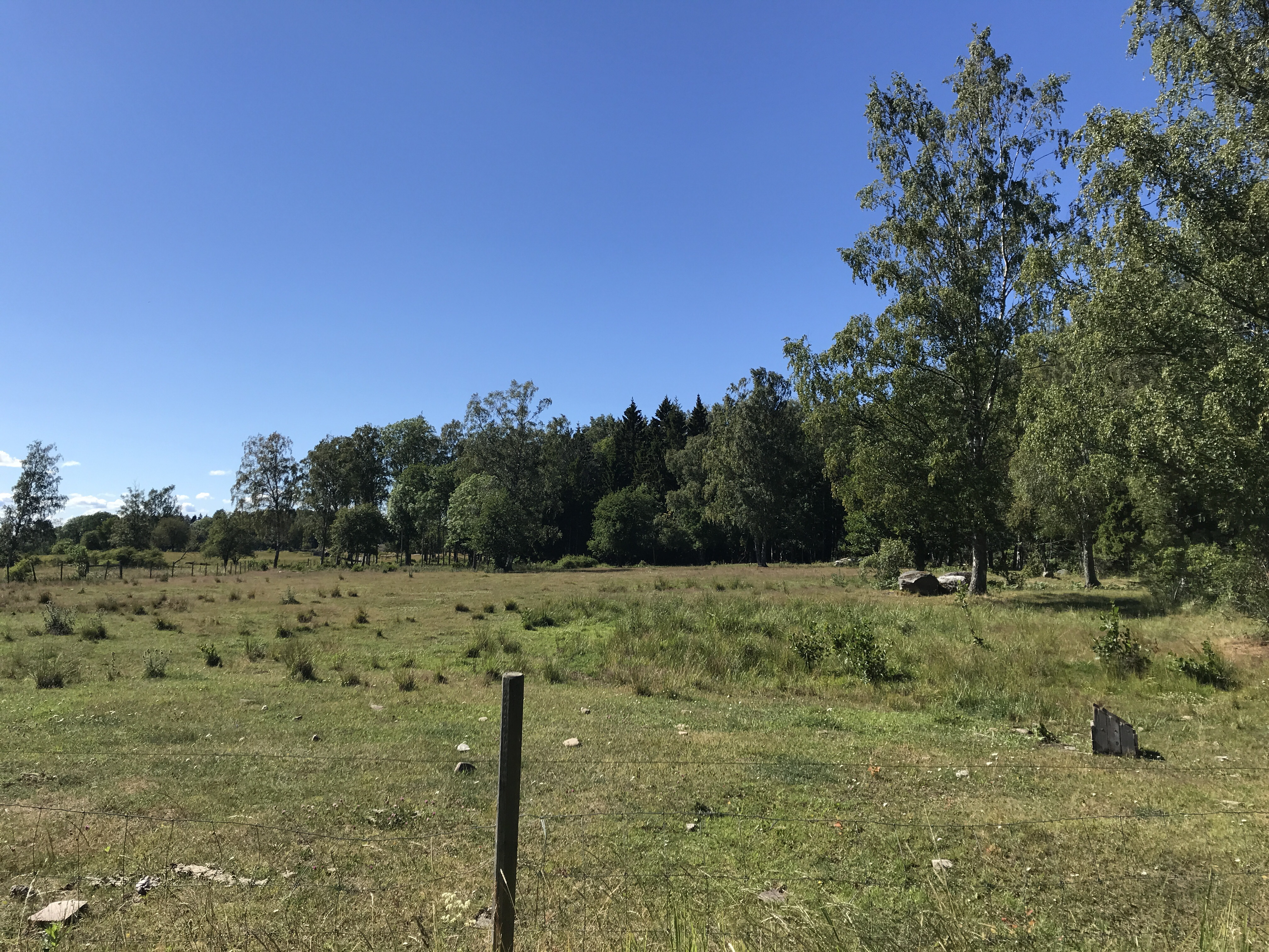 Lidö